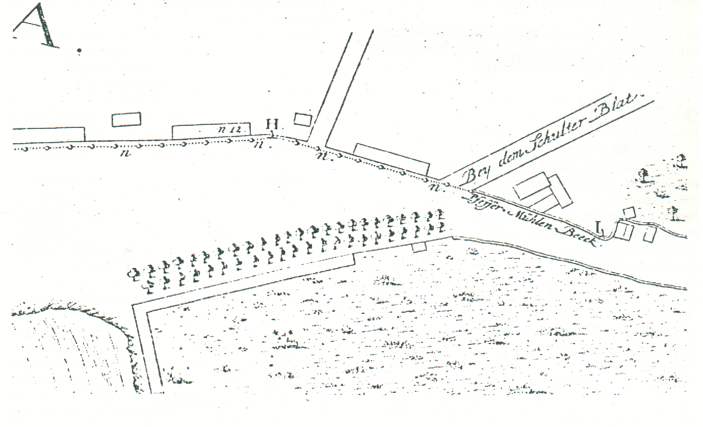 Ausschnitt aus einer Karte aus dem Jahr 1745 über den Altona-Hamburger-Grenzvergleich Dem, über den Altonaischen Gräntz Vergleich de Dato 17. Nov. 1740 errichteten Executions-Recesse de dato 11. Junij 1744 gemäss, aus den gemeinschaftlich gemachten grösseren Rissen nach dem verjüngten Maas-Stab verfertigte Gräntz-Charte, worauf die Gräntz-Zeichen zwischen der Stadt Hamburg und Altona beschrieben ... / ausgemessen und delinieret durch C. G. Dilleben ; C. G. Trew ; J. O. Hasenbanck. Gest. von G. C. Pingeling; aus: Projektgruppe Wohnen im Stadtteil: Der Schulterblatt. Ein Viertel verändert sich, Hamburg 1982, S. 21